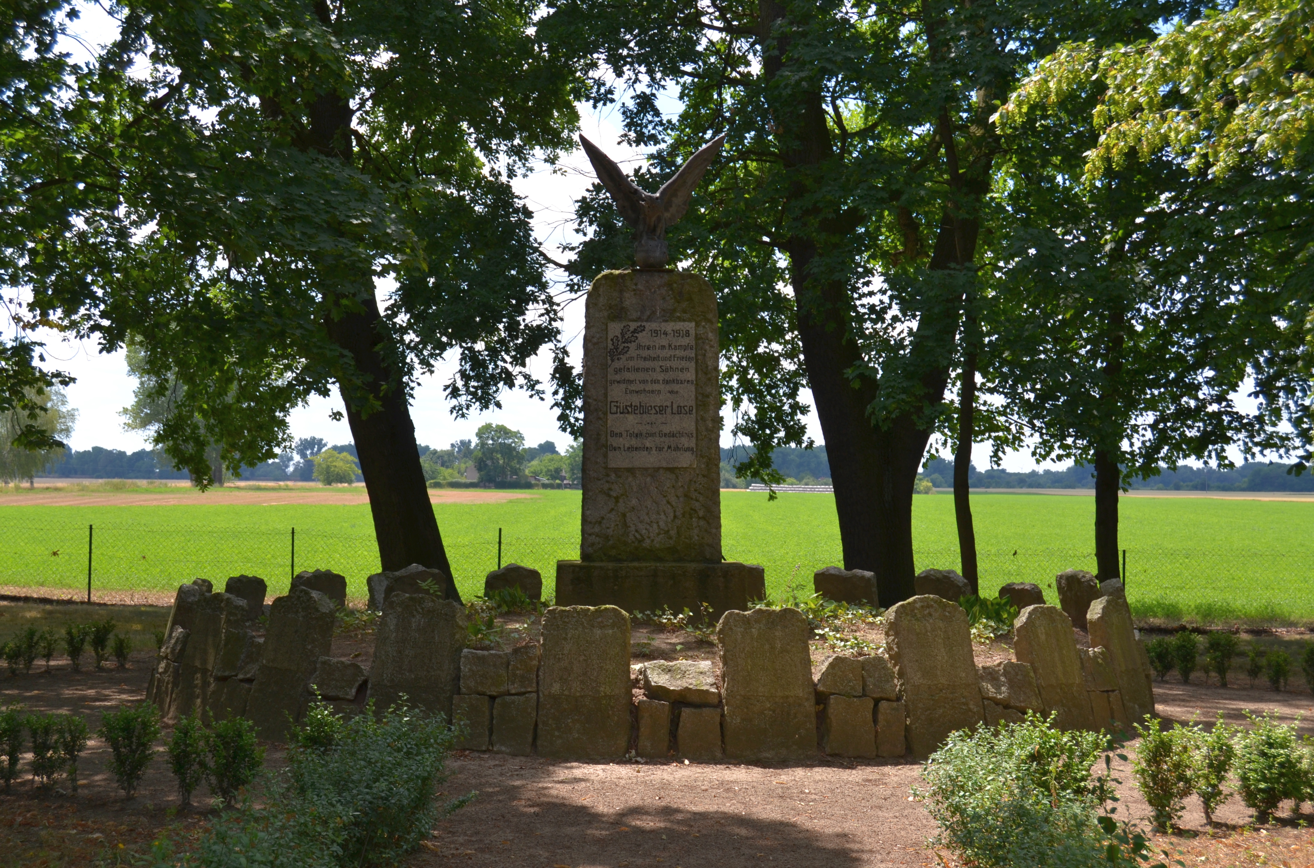 Friedhof von Güstebieser Loose, Ortsteil der Gemeinde Neulewin. Auf dem Friedhof findet sich ein Denkmal für die Opfer des Ortes im 1. Weltkrieg. Fotoprojekt – Zwischen Berlin und Oder 2014 Photo project “Between Berlin and River Oder 2014”